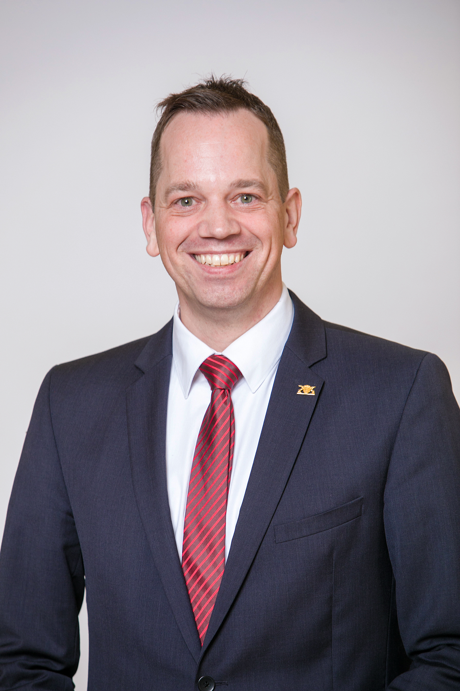 Nicolas Fink SPD Landtagsabgeordneter BW